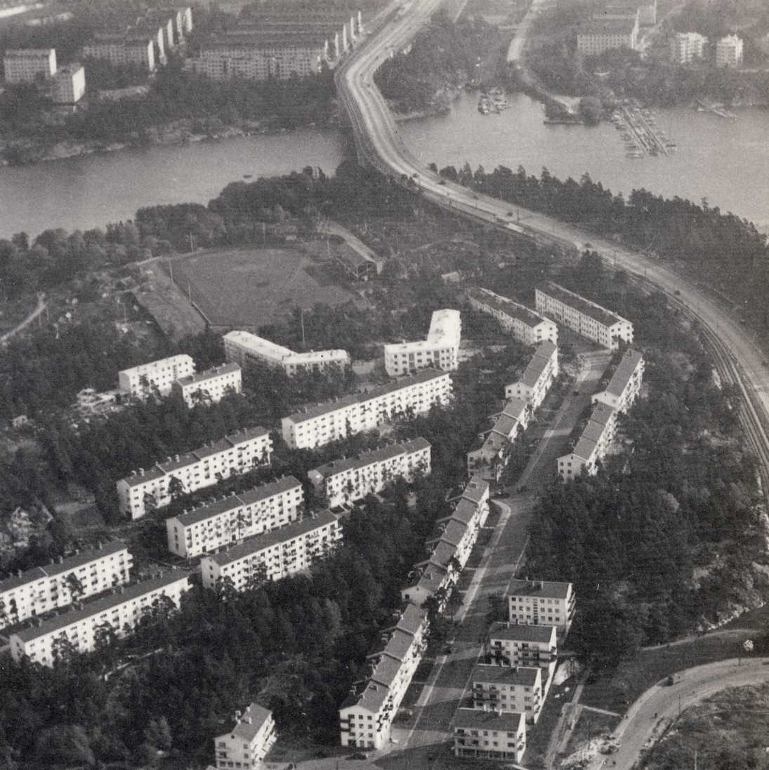 Stadsdelen Traneberg i Stockholm 1935, i bakgrunden syns den nya Tranebergsbron